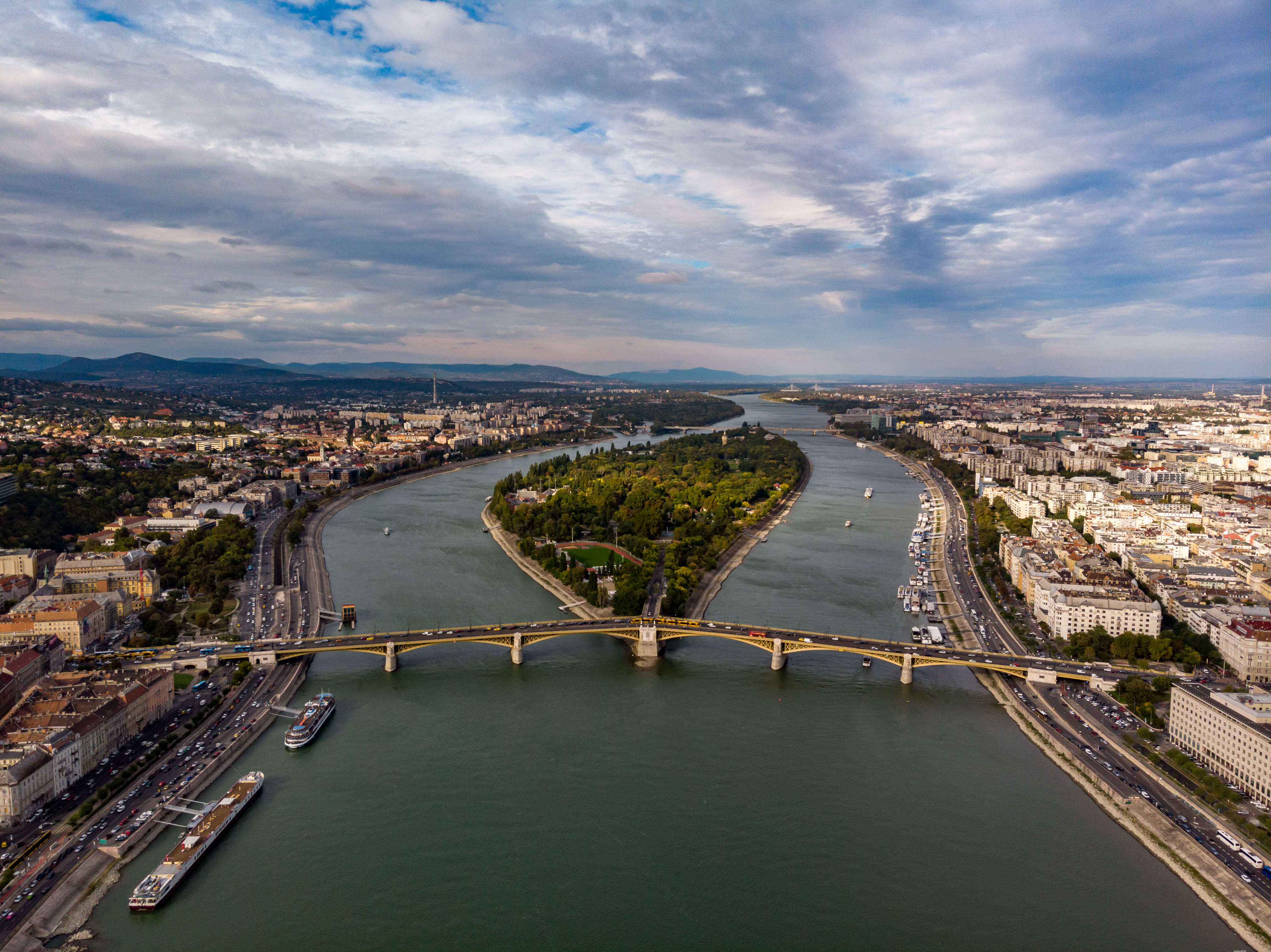 Budapest, Margarethenbrücke und Margaretheninsel